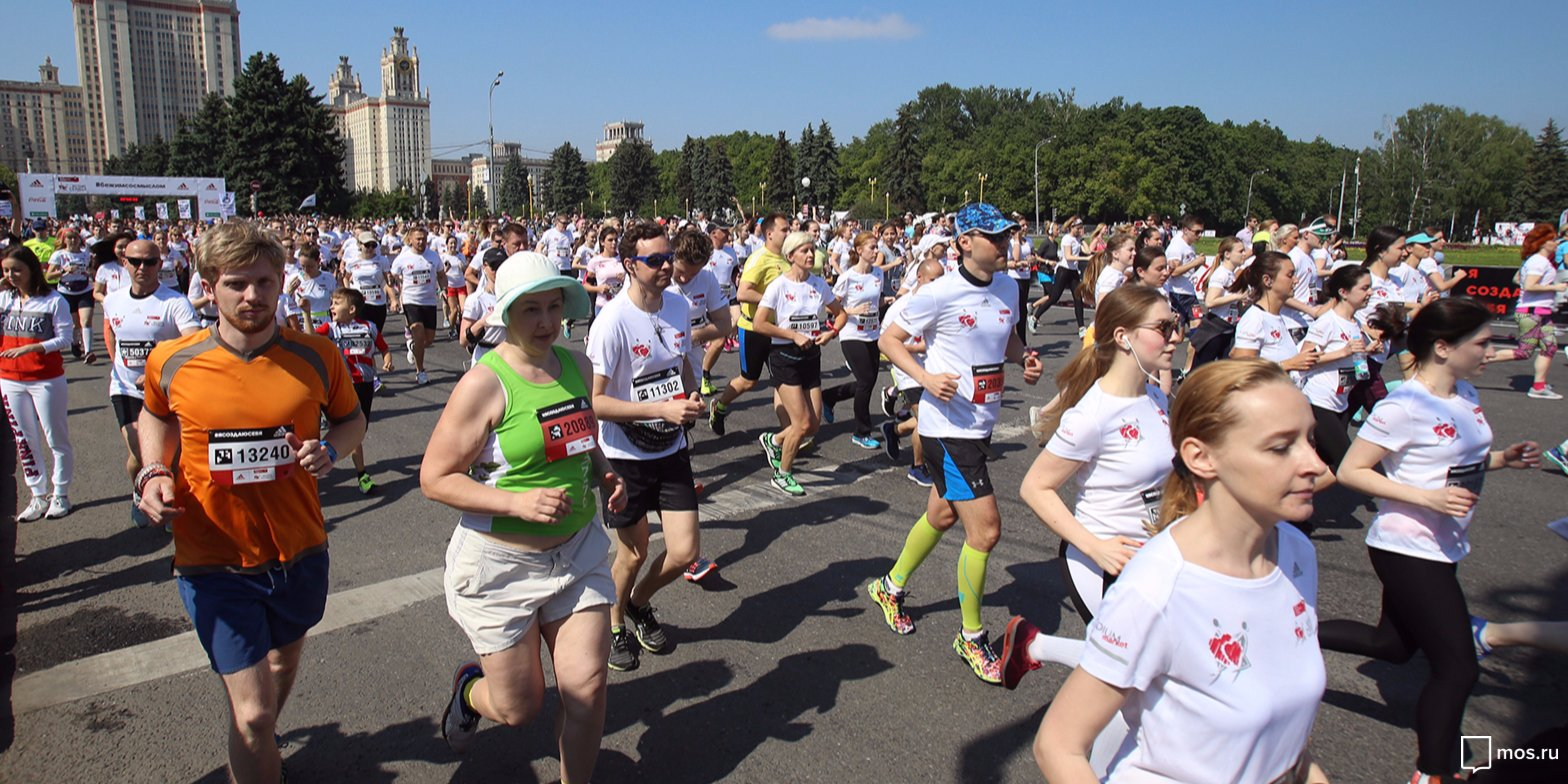 Template:Ru=1